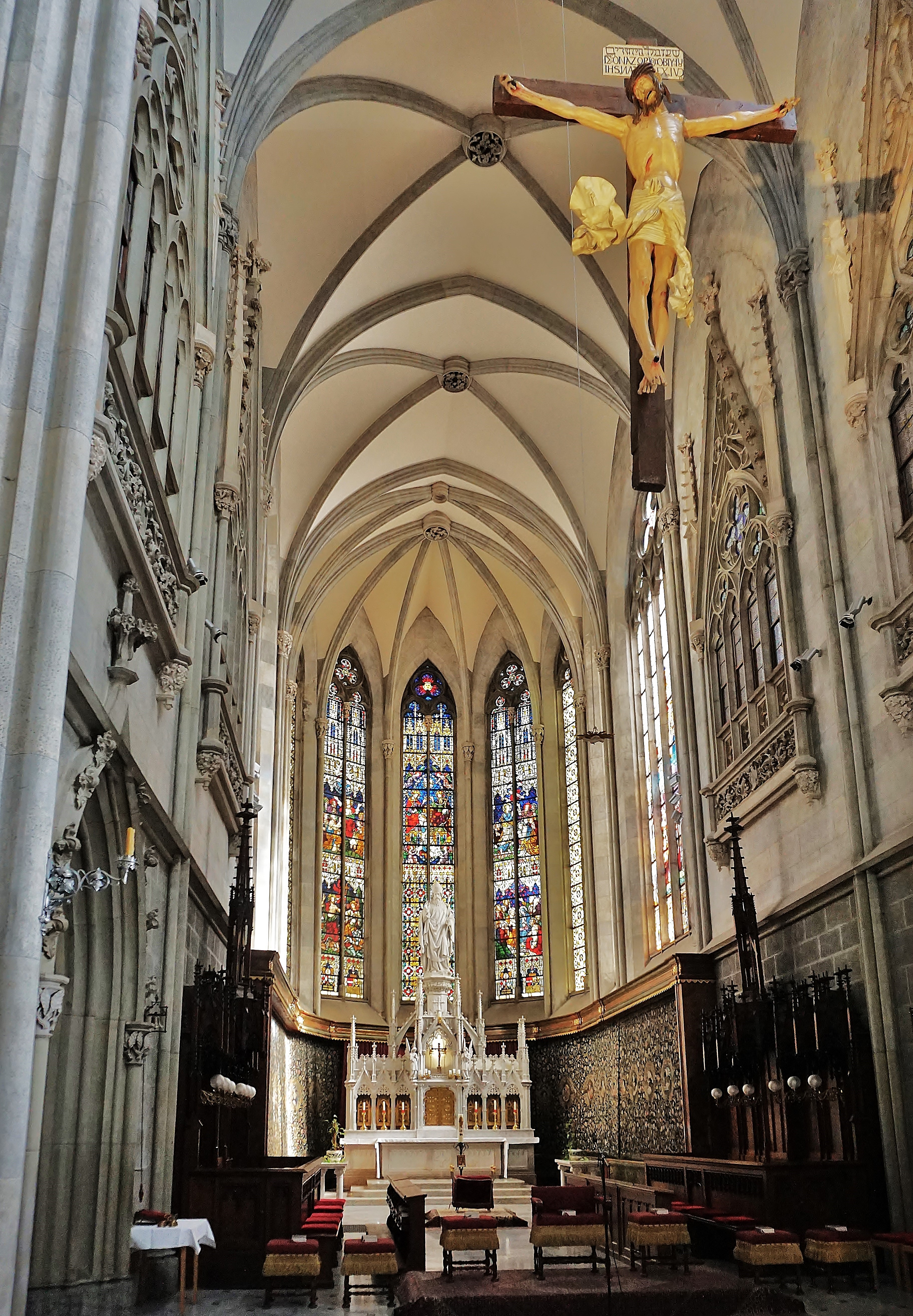 Stiftkirche Admont, Blick in den Chor